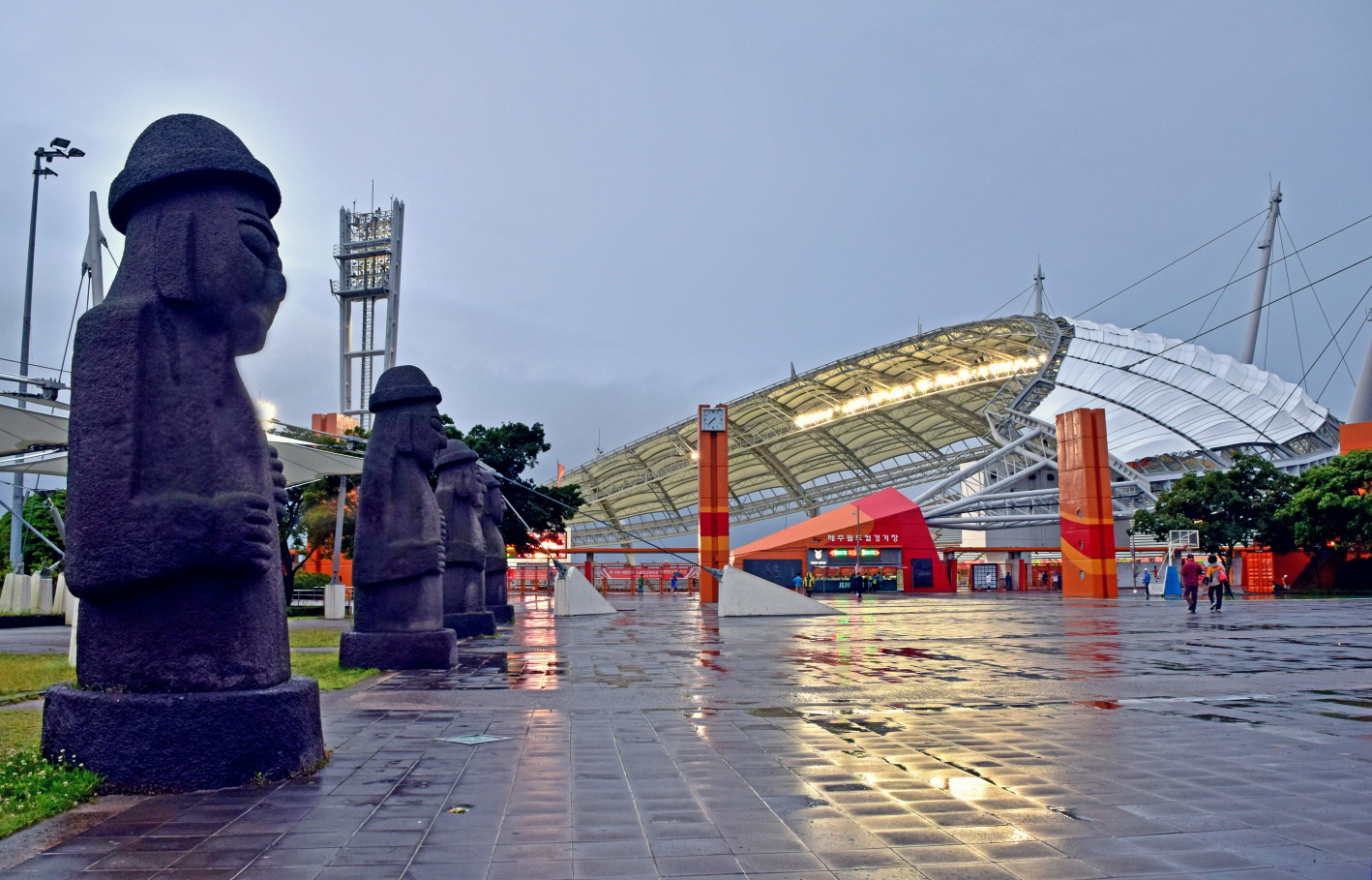 제주월드컵경기장